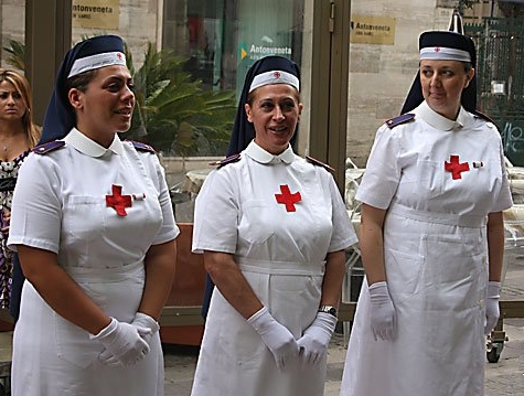 Infermiere Volontarie della Croce Rossa Italiana